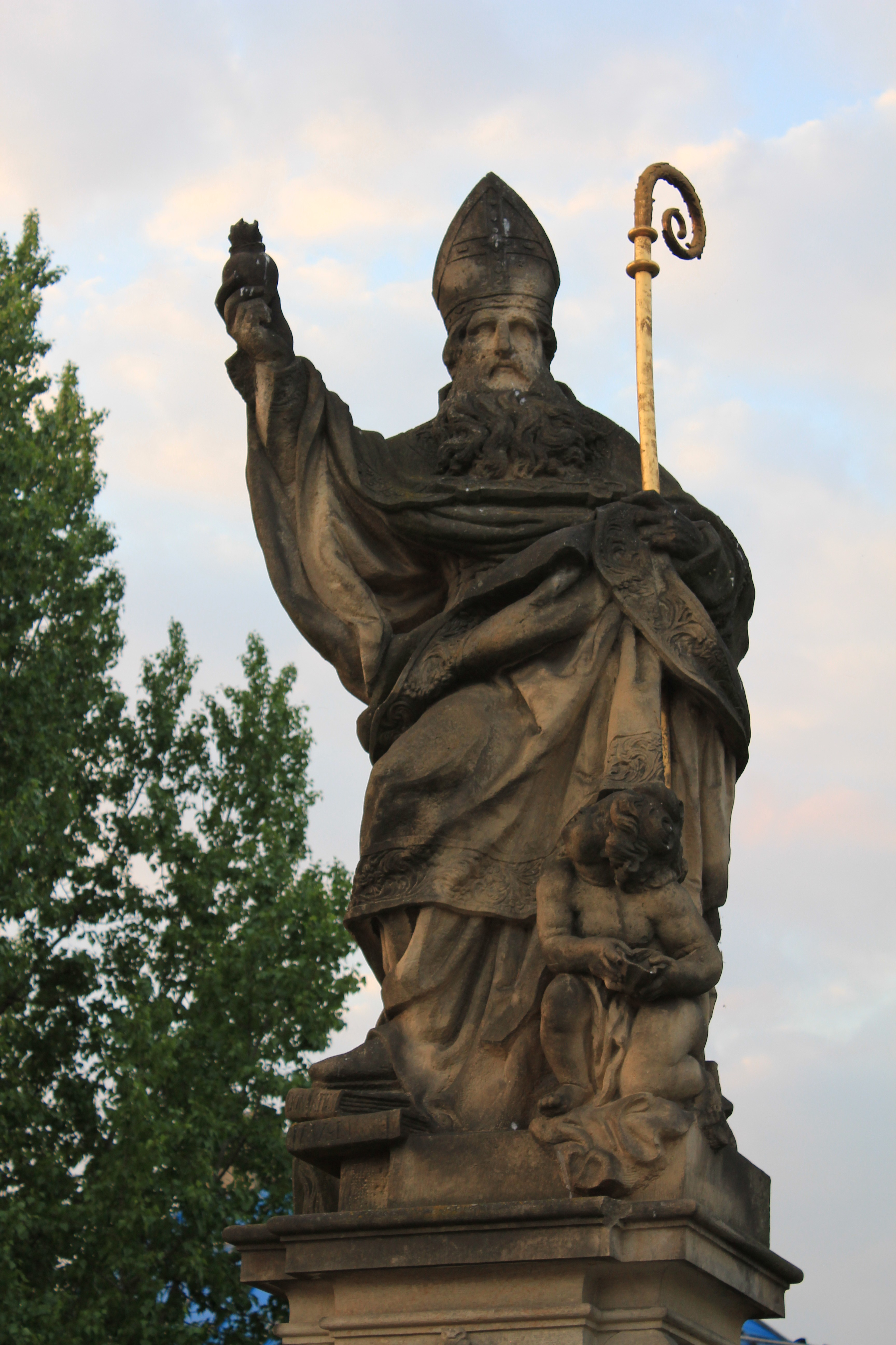 Statue på Karlsbrua